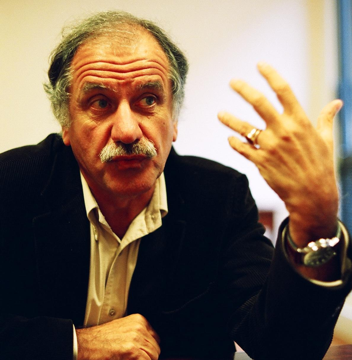 Noël Mamère interviewé à son bureau de l'Assemblée nationale